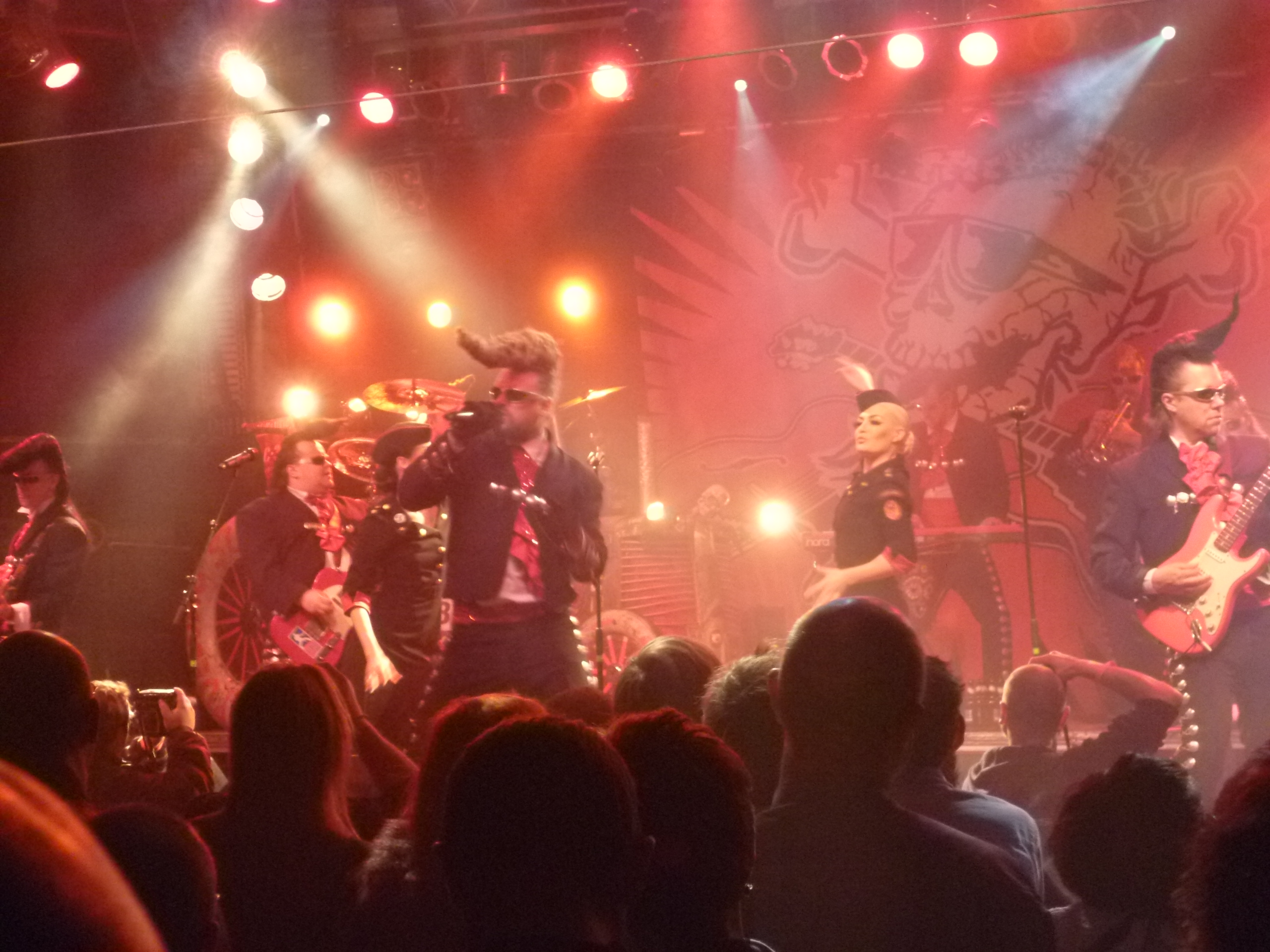 Leningrad Cowboys in Saarbrücken (Garage)